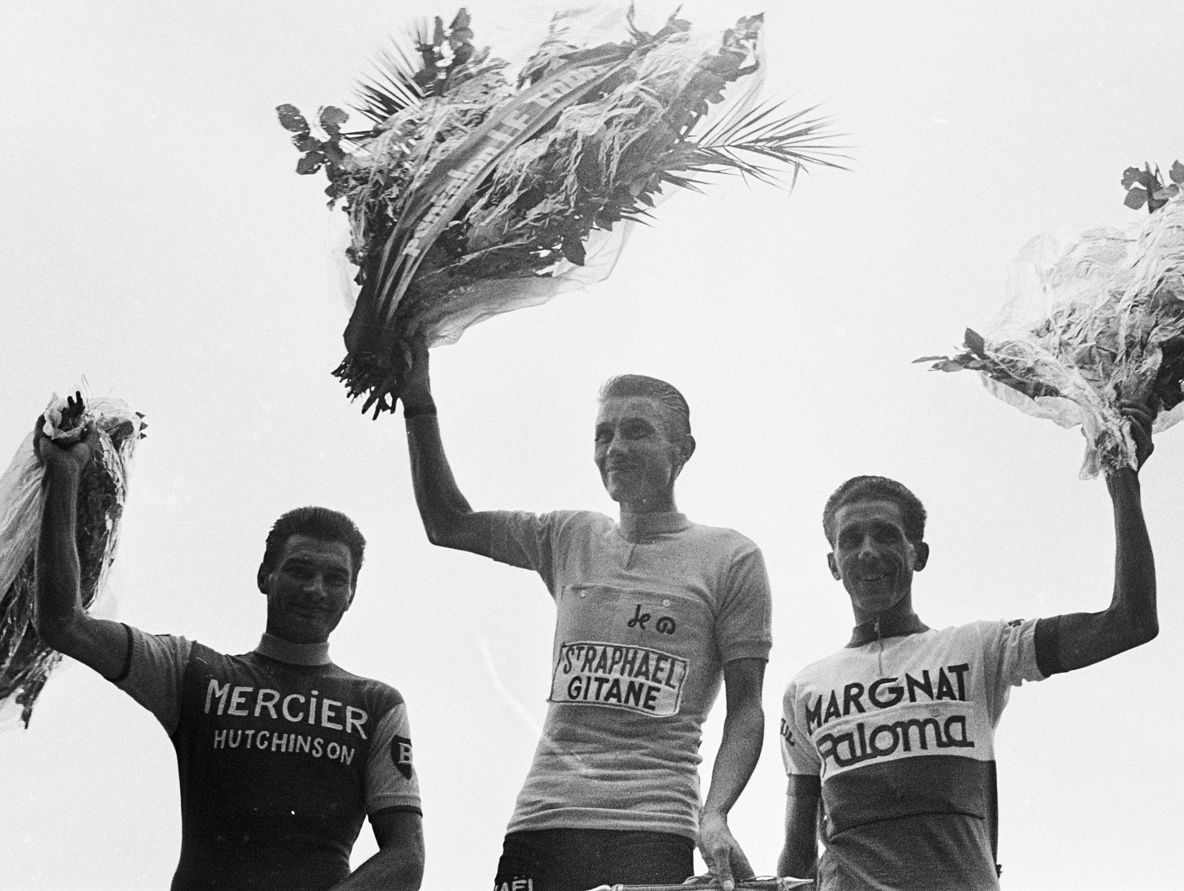 51e Tour de France aankomst te Parijs, op het erepodium v.l.n.r. Poulidor, Anquetil en Bahamontes.